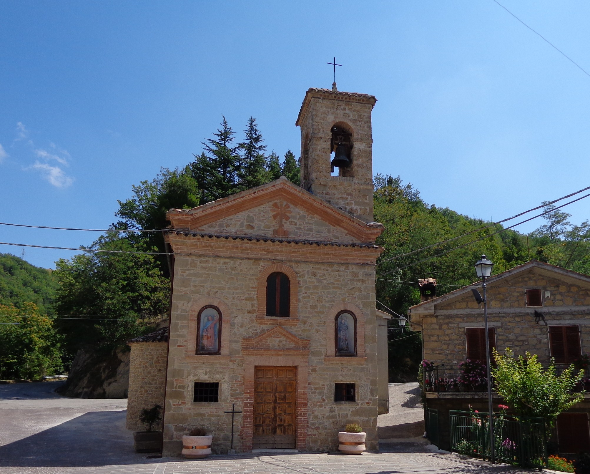 Palmiano, chiesa di San Michele Arcangelo.